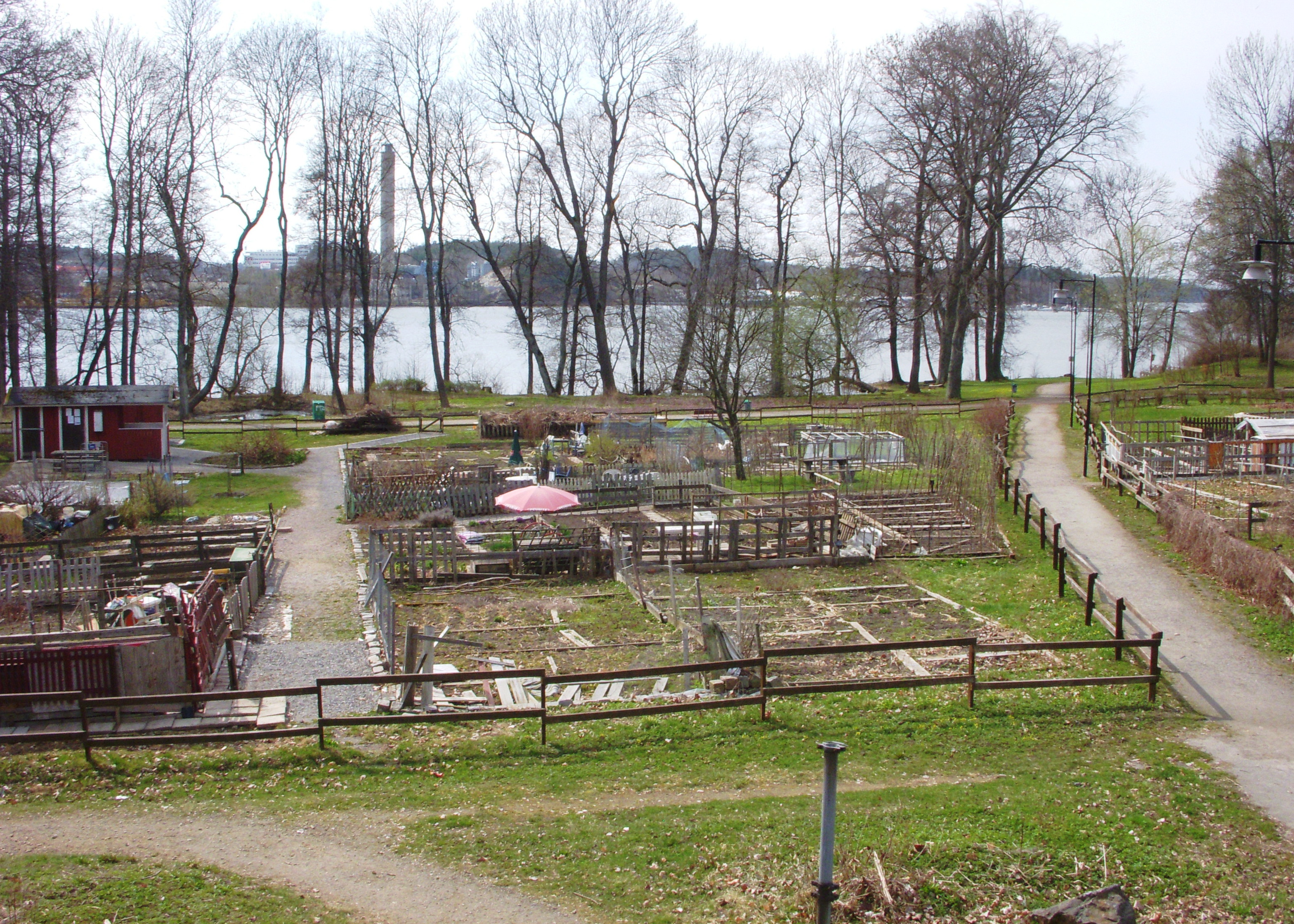 Koloniträdgårdar i Vårby gård